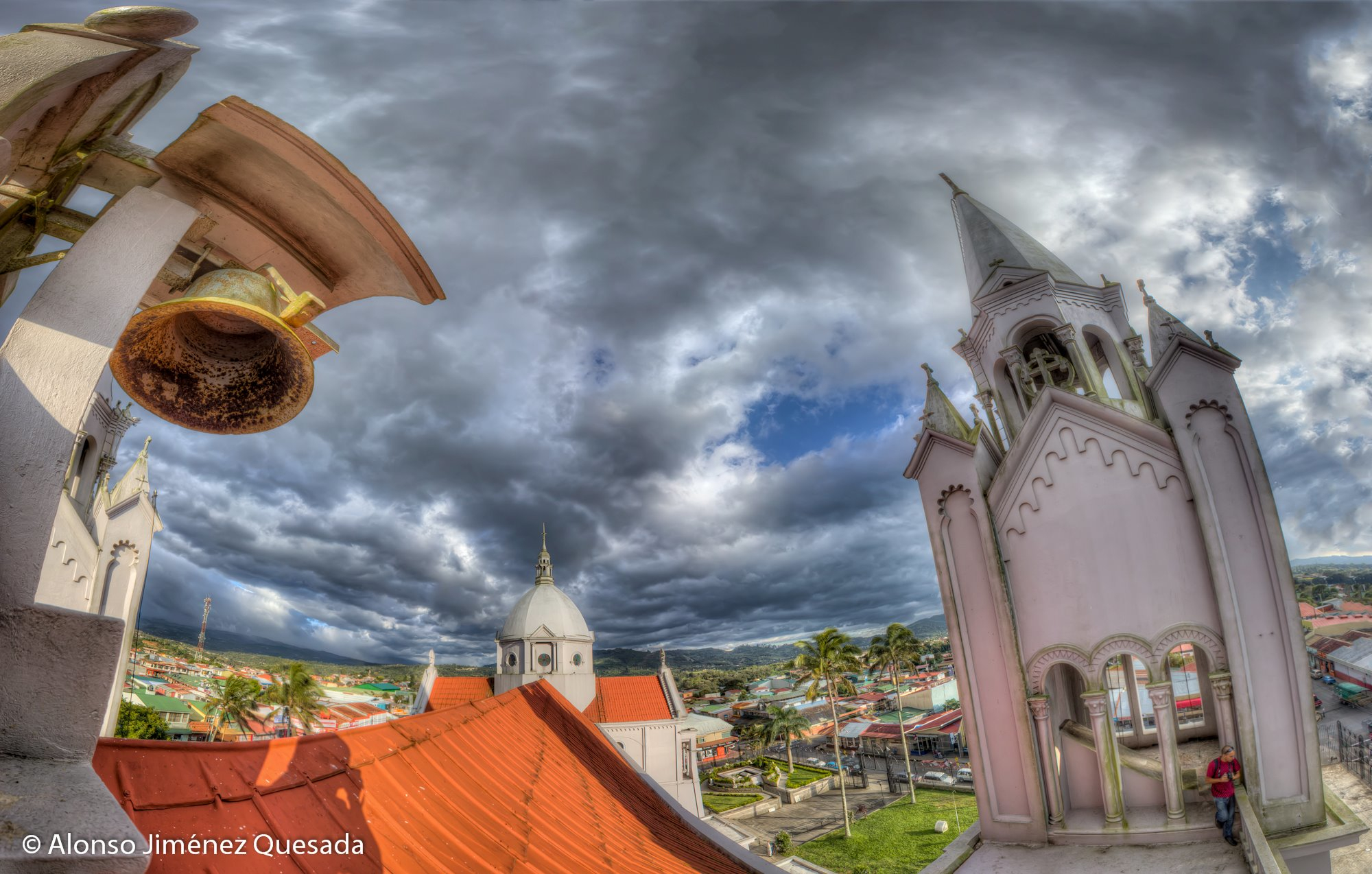 Parroquia de San Ramón de Alajuela. Vista desde el techo.